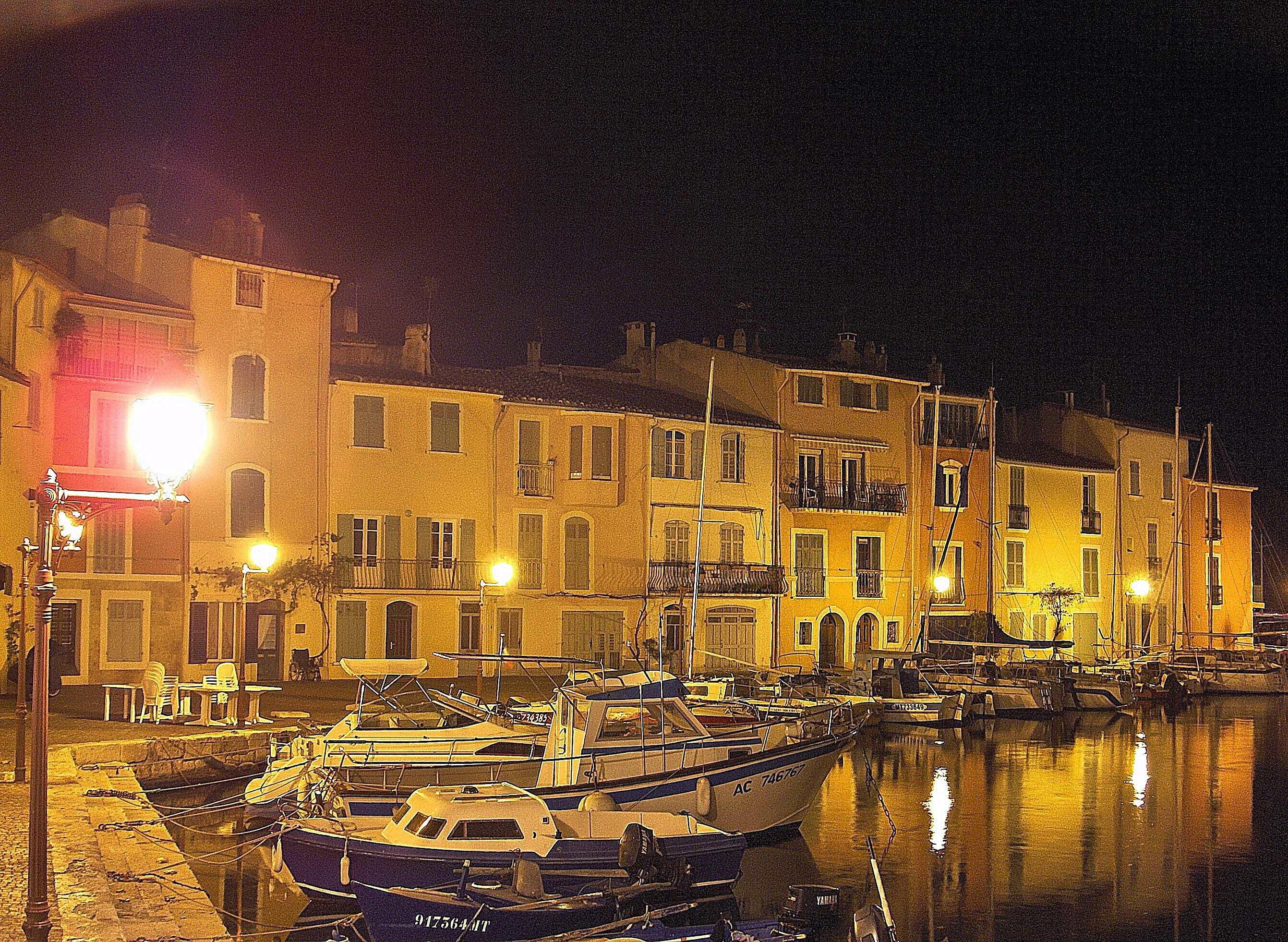 Le Miroir aux oiseaux (nuit) (Martiques, France)